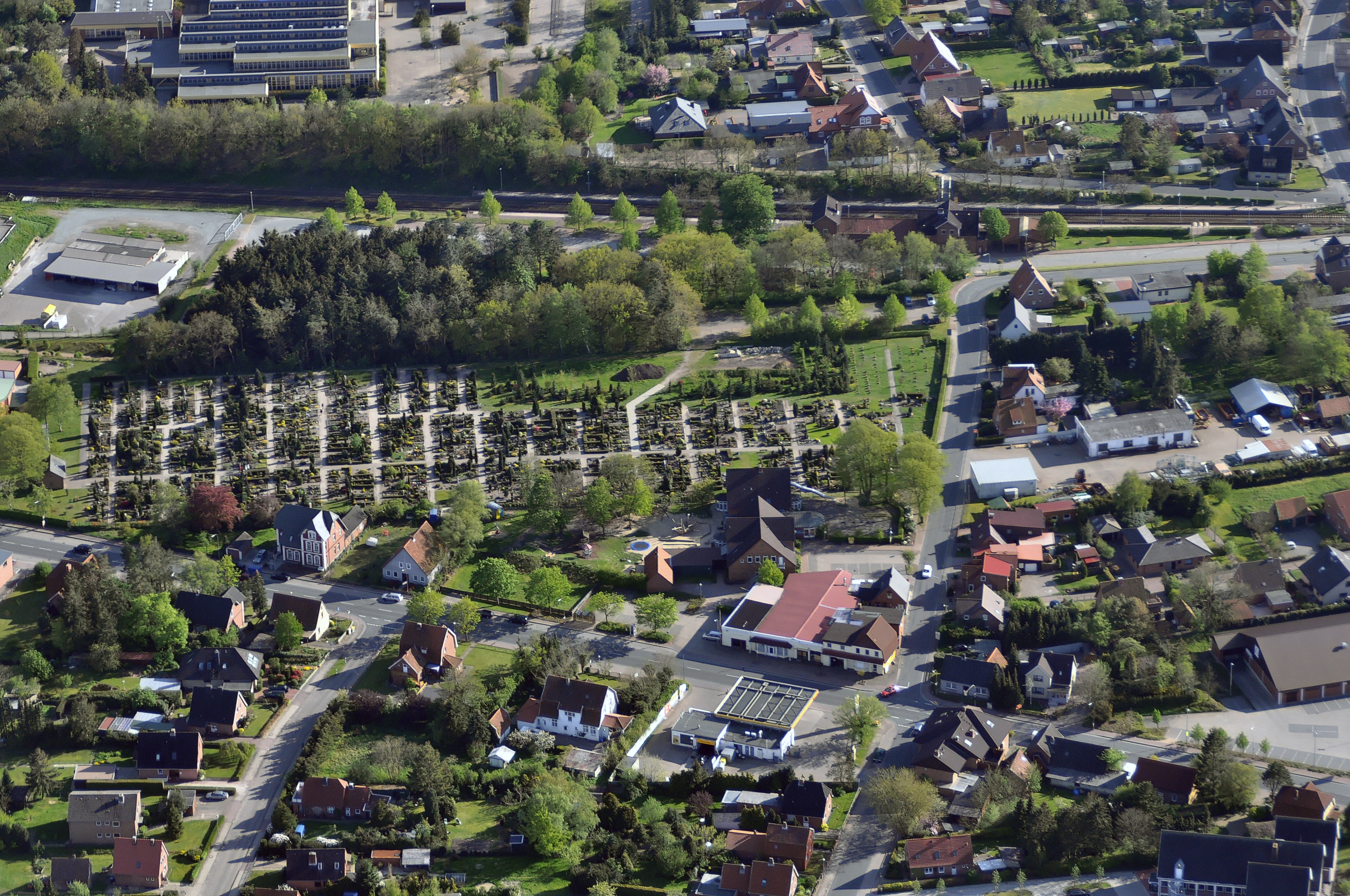 Luftbilder von der Nordseeküste 2012-05